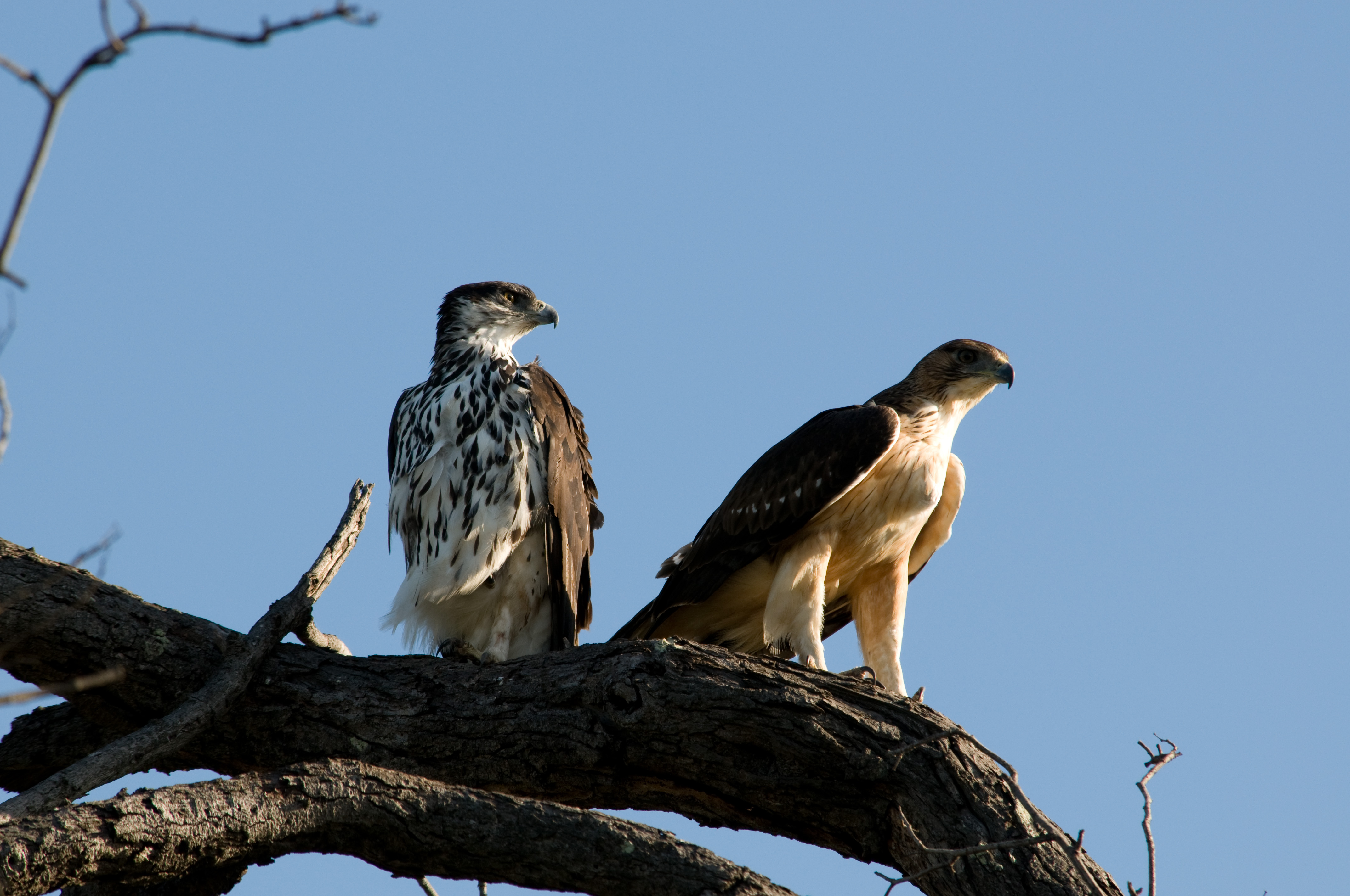 Aragonés: Aquila spilogaster.